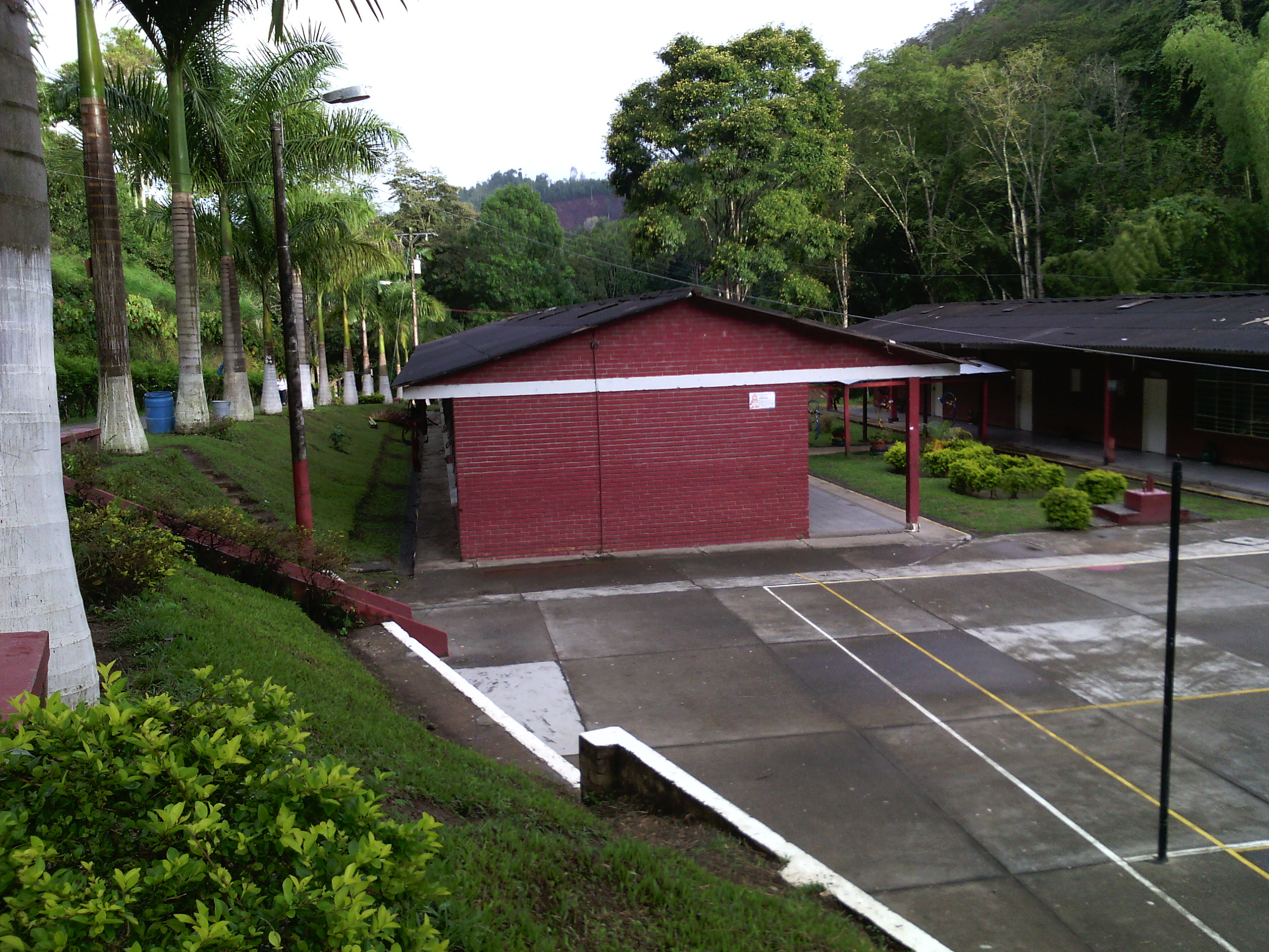 Institución Educativa Santiago Gutiérrez Ángel. Argelia, Valle del Cauca, Colombia.